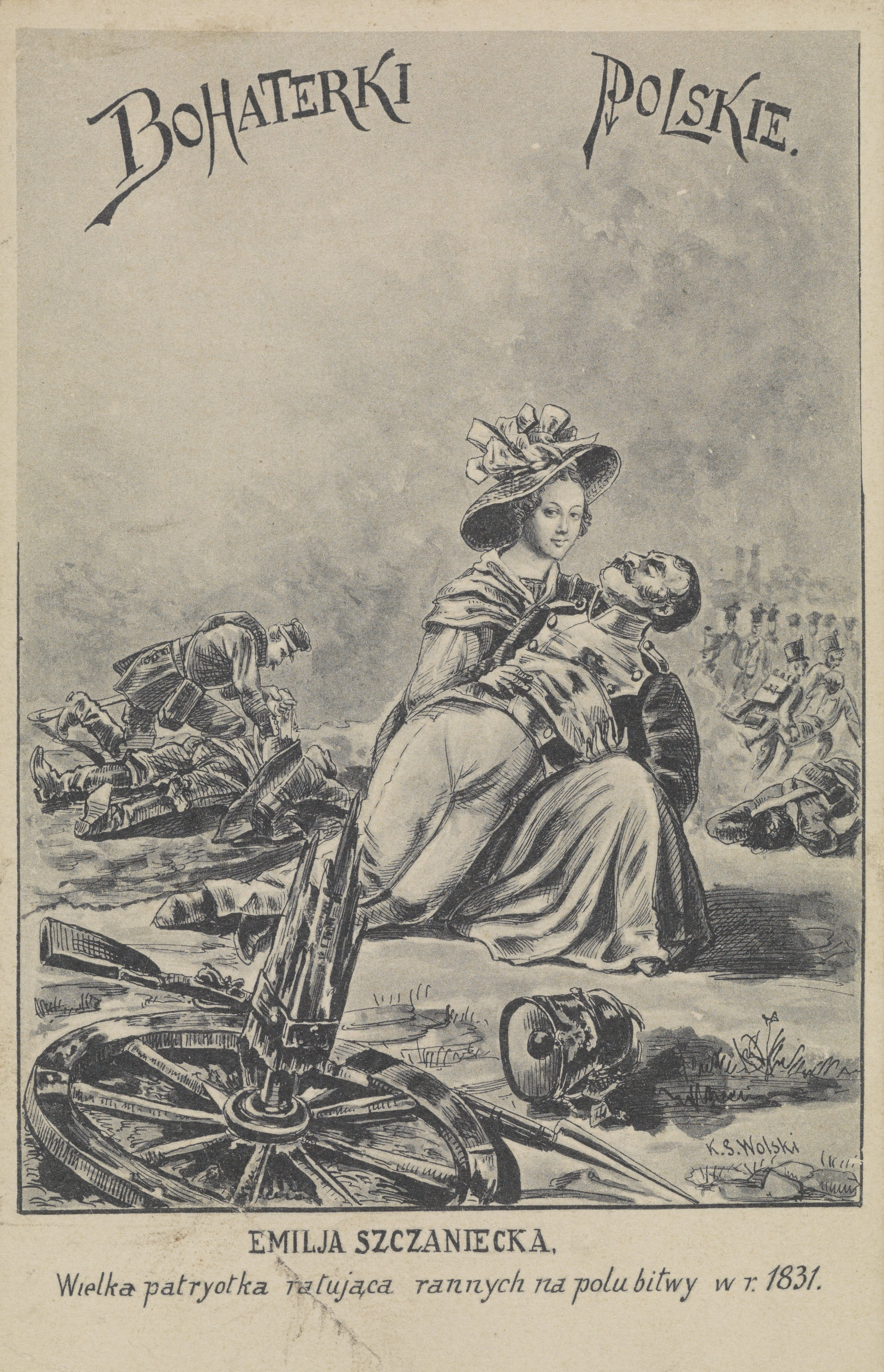 Emilia Sczaniecka, wielka paryotka ratująca rannych na polu bitwy w r. 1831 - rycina Kajetana Saryusz-Wolskiego